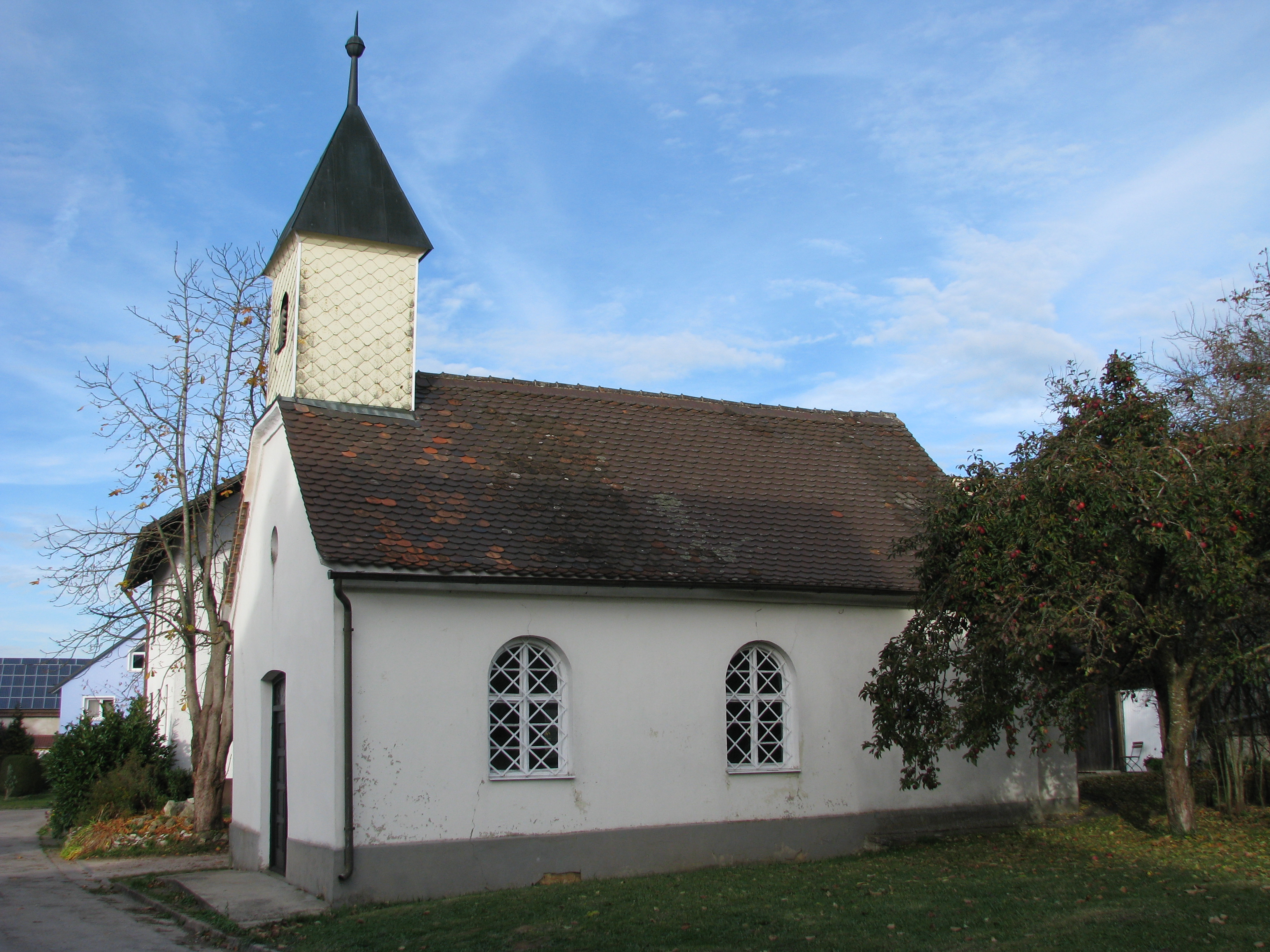 Kleinnottersdorf, Ortsteil der Stadt Greding im mittelfränkischen Landkreis Roth in Bayern, Ortskapelle